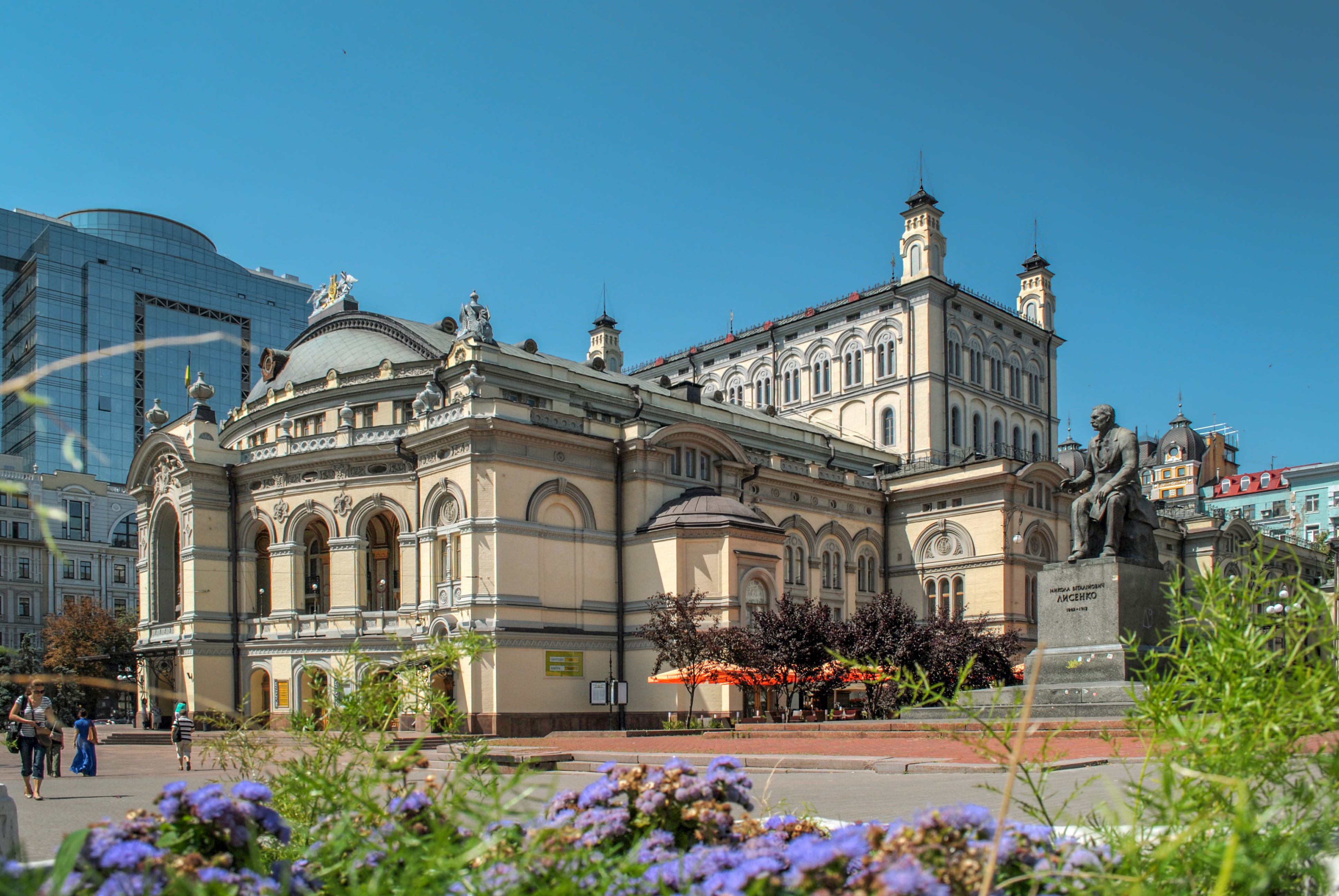 Театр міський (Національна опера України ім. Т. Г. Шевченка), де у 1911 р. було смертельно поранено Столипіна П.; 1917 р. на ІІ Всеукраїнському військовому з'їзді було проголошено І Універсал Центральної Ради, Київ, Володимирська вул., 50